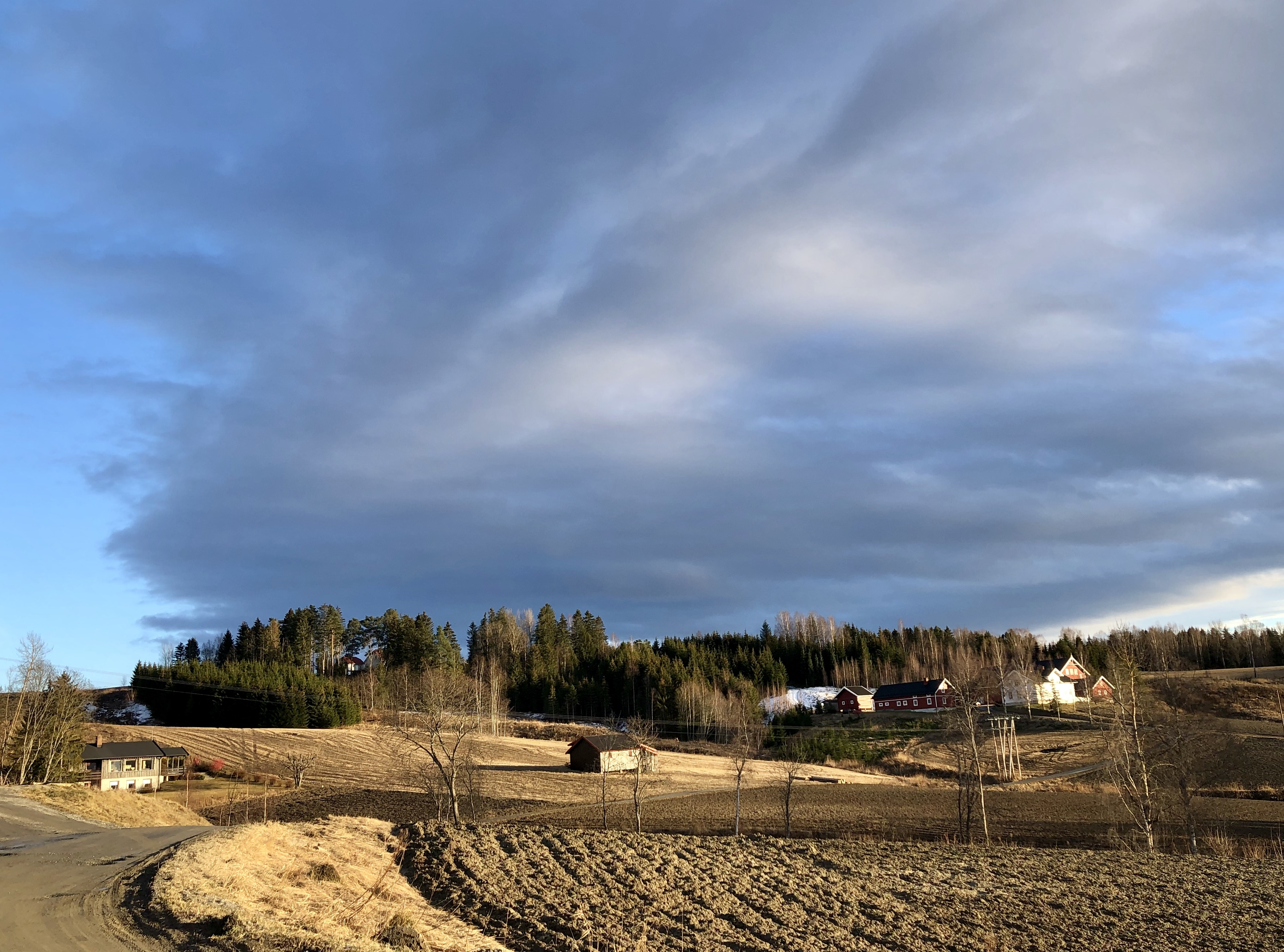 Trøttilsrudveien, Ringerike, med Trøttilsrud gård til høyre i bildet.